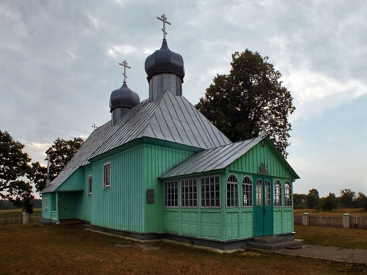 Чэрск. Свята-Міхайлаўская царква